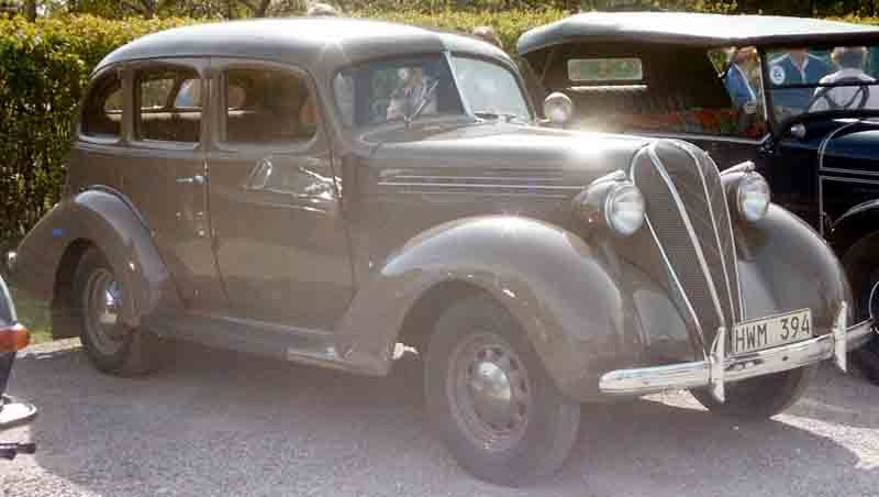 Terraplane De Luxe Series 61 4-Door Sedan 1936